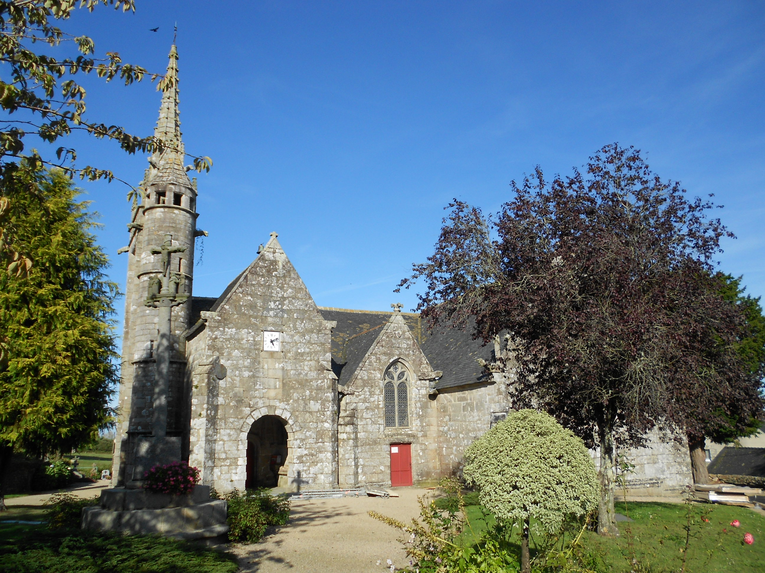 Eglise des 15ème et 16ème siècles.